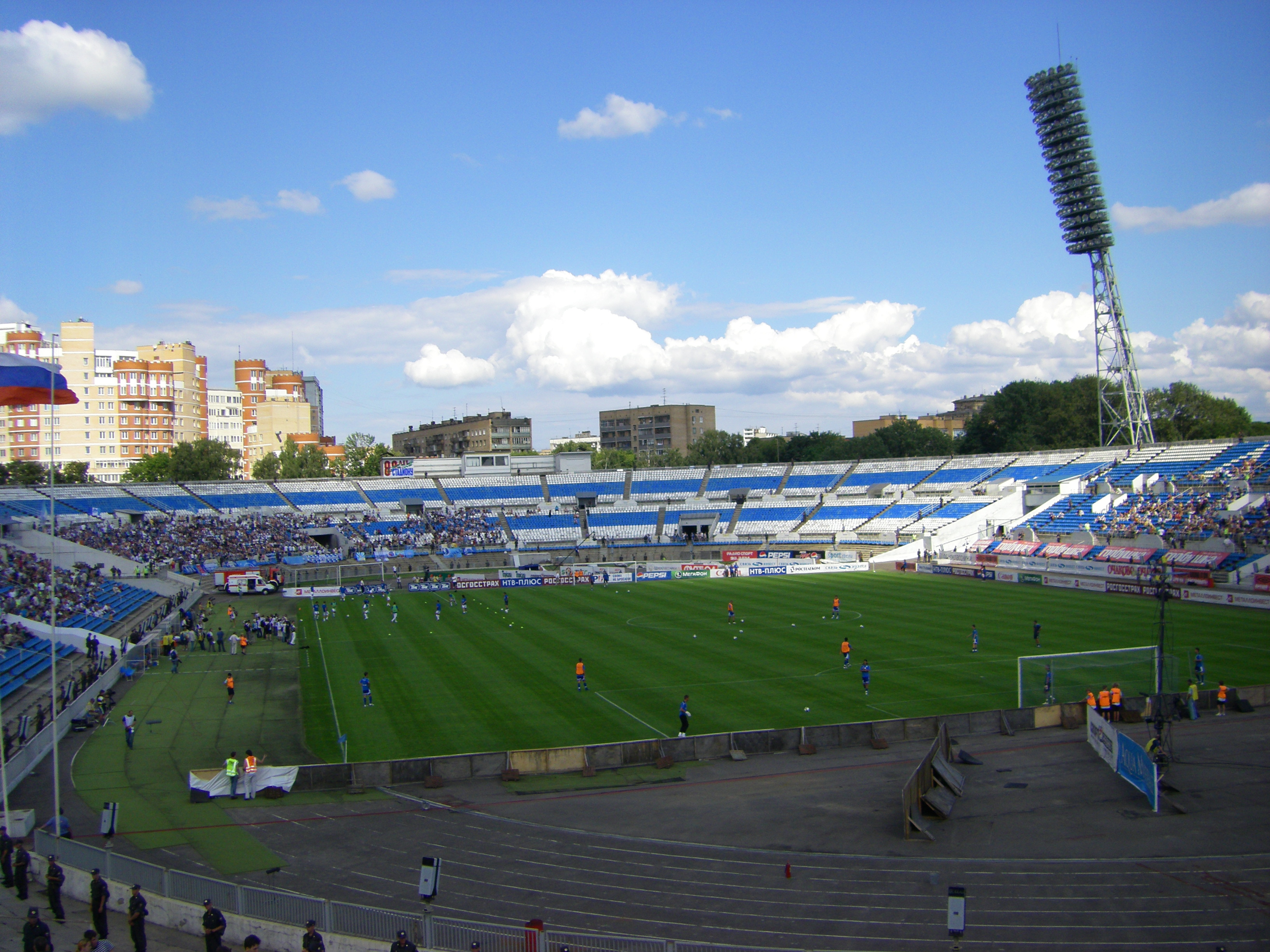 Innenansicht des Moskauer Dinamo-Stadions